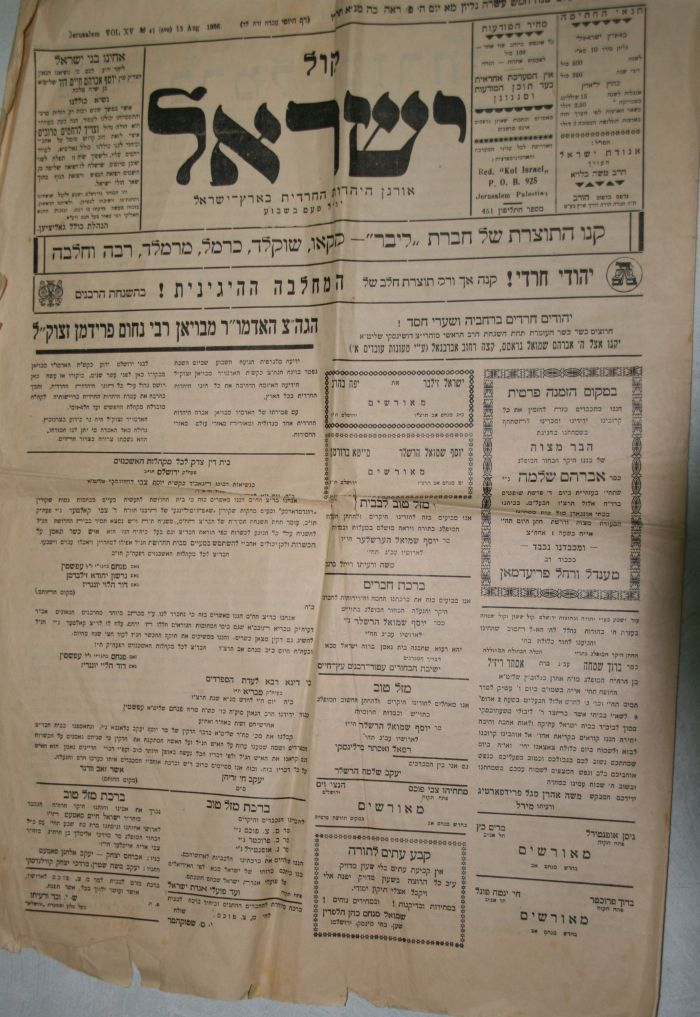 1936 Jerusalem Newsaper